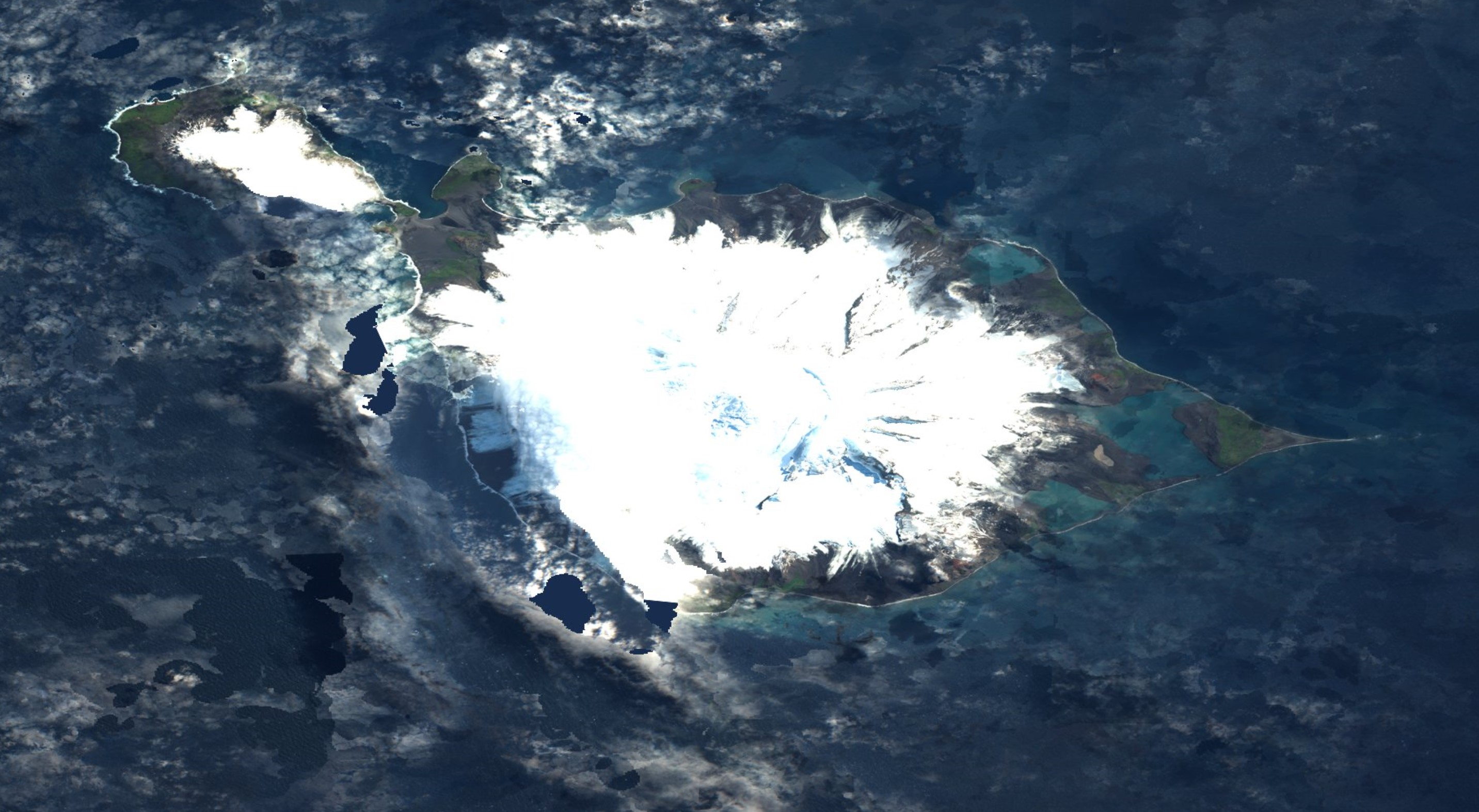 Heard Island (Satellitenbild)